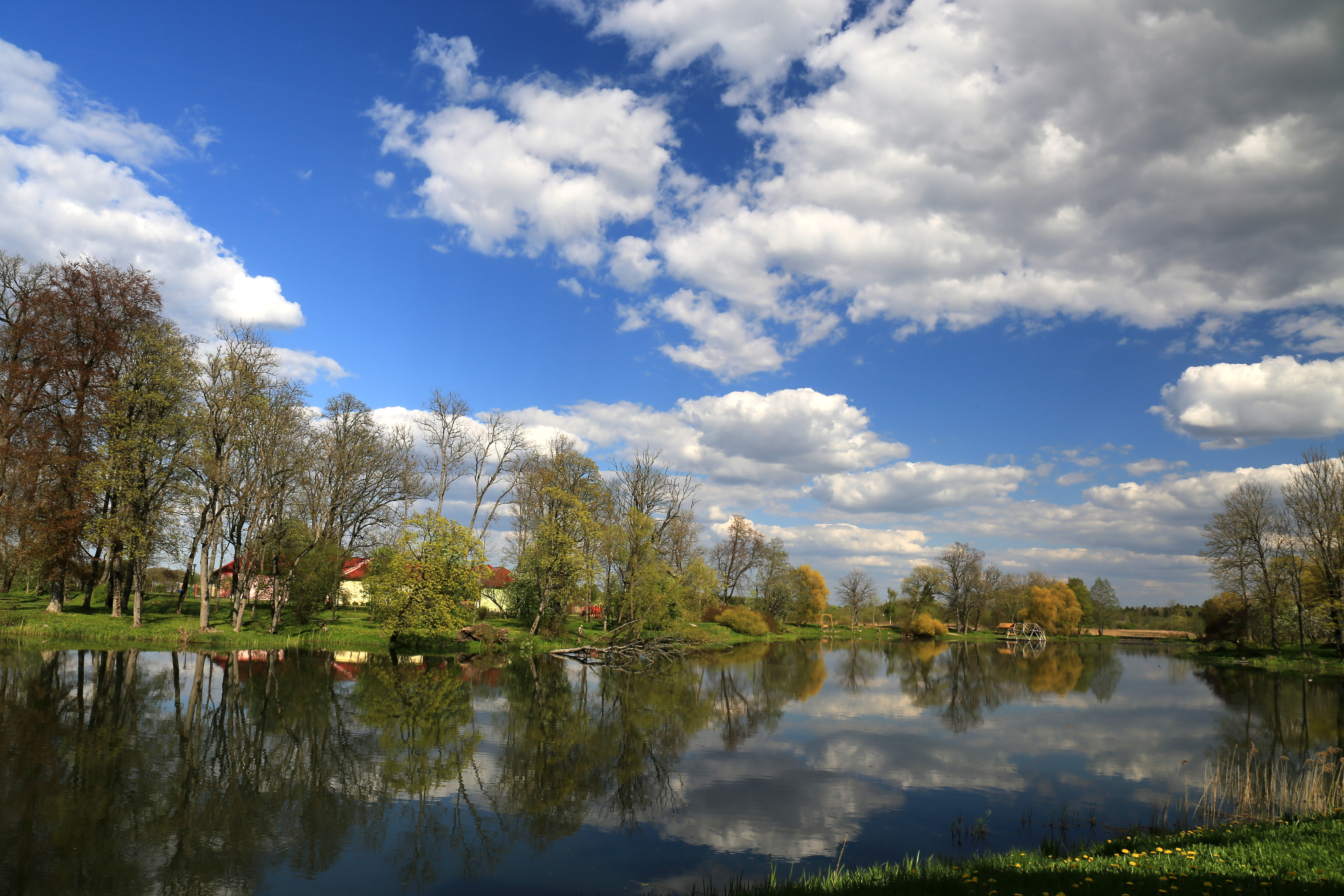 Cīravas dzirnavu dīķis / mill pond